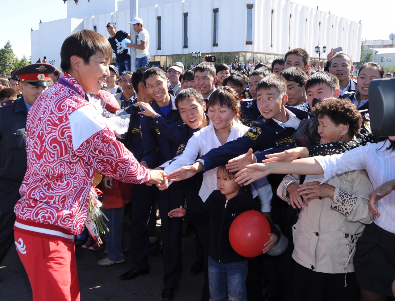 Народ встречает